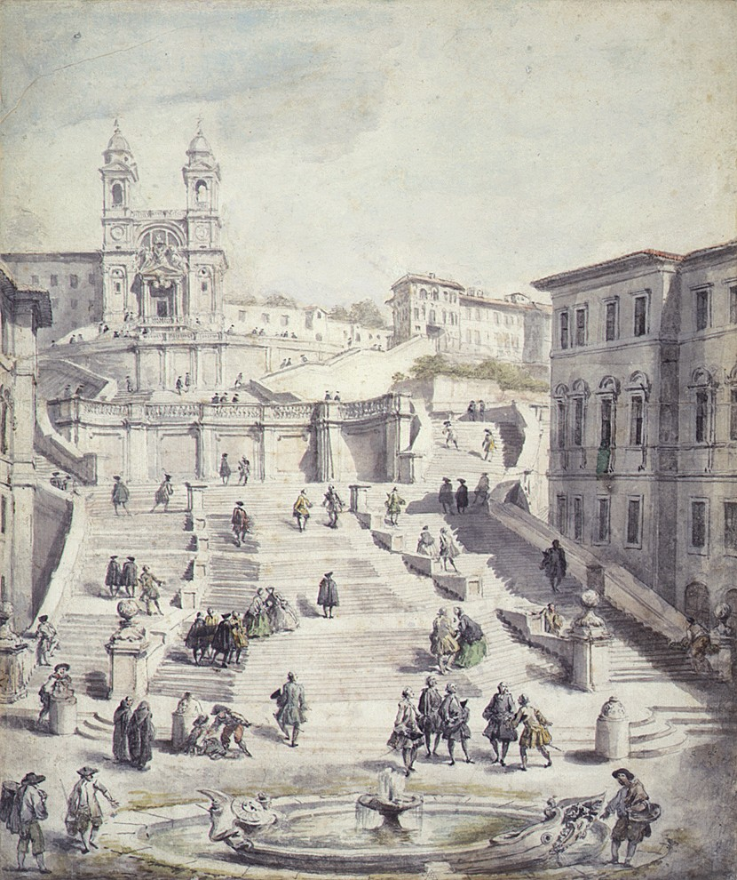 Drawing; Drawings